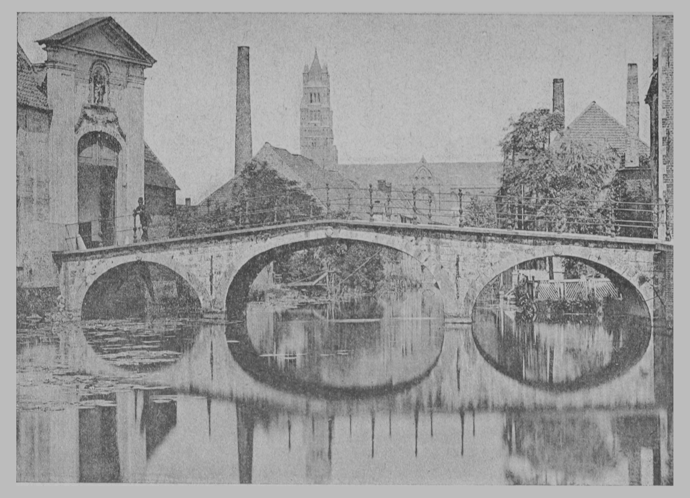 Bruges-la-Morte (Zicht op de Begijnhofbrug met het poortgebouw van het Prinselijk Begijnhof De Wijngaard)